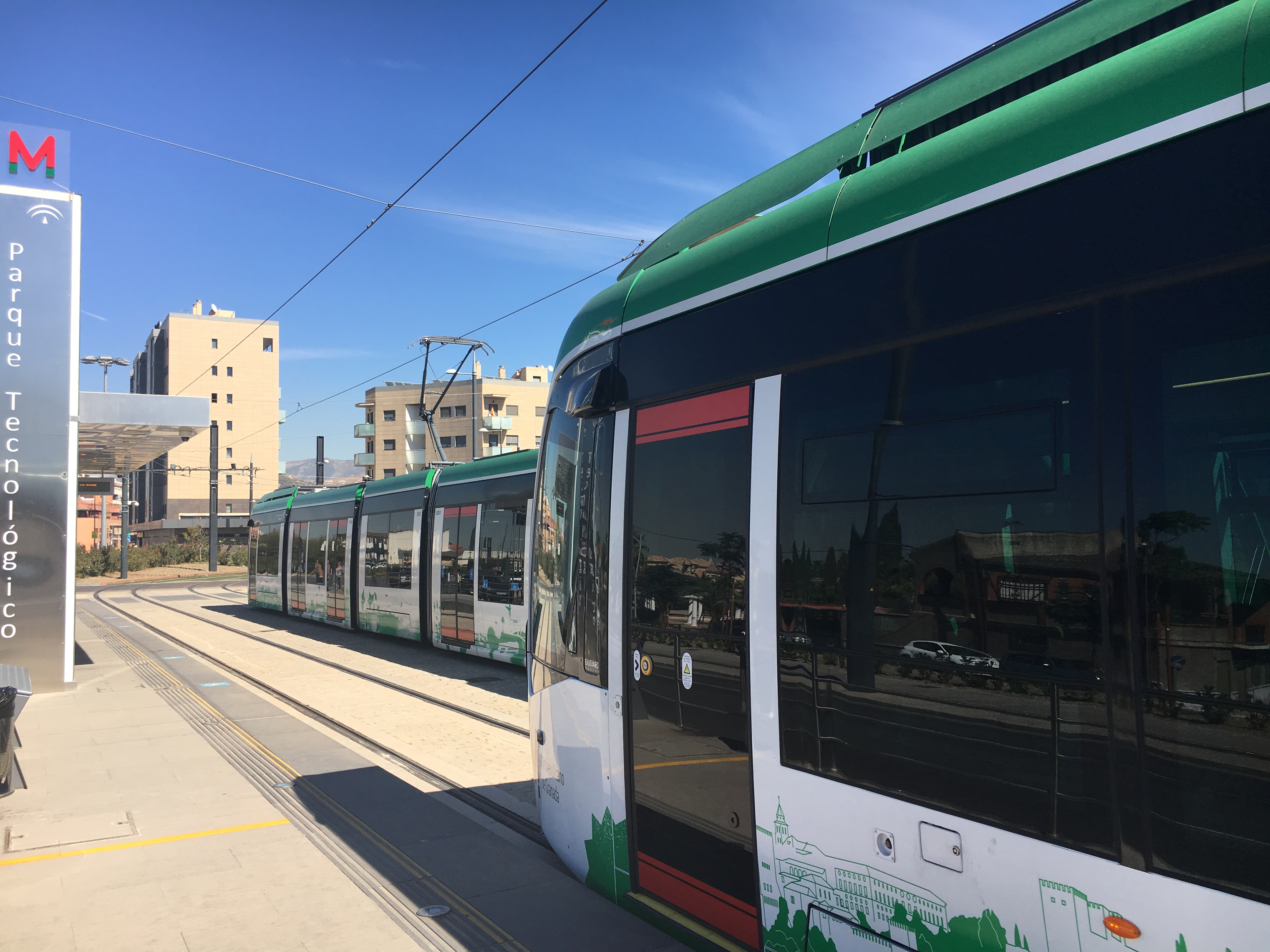 Dos unidades del Metro de Granada, una por sentido, en la Estación de Parque Tecnológico.